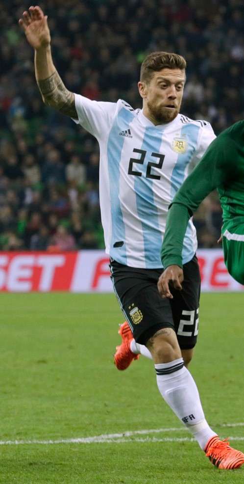 Brian Idowu, Alejandro Darío Gómez